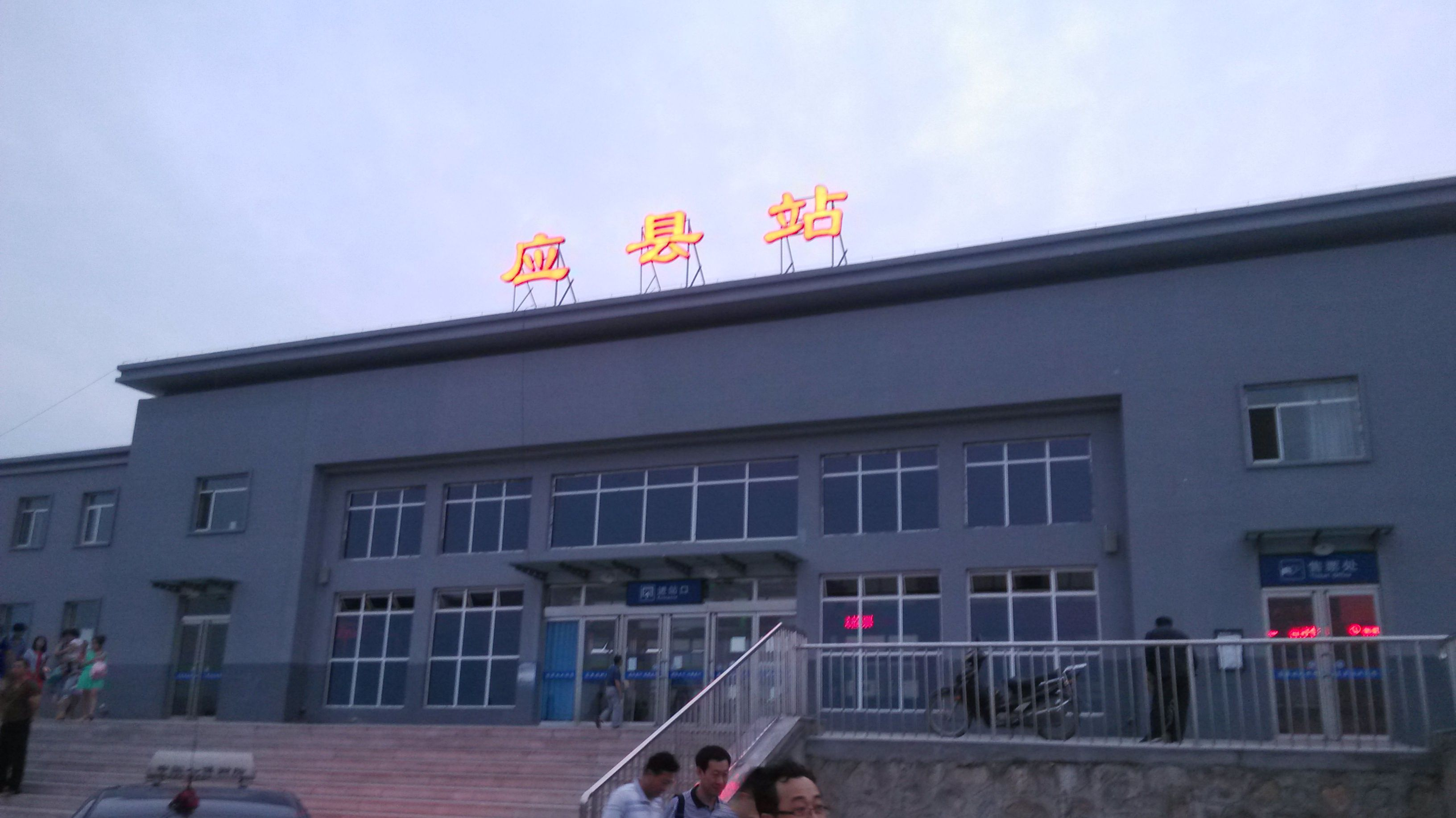 应县站。摄于山西省朔州市应县臧寨乡马庄村。